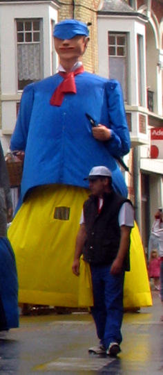 Ham (Somme, France) - Animation festive au centre-ville, un dimanche de printemps. Le géant Tchout Jaques. .